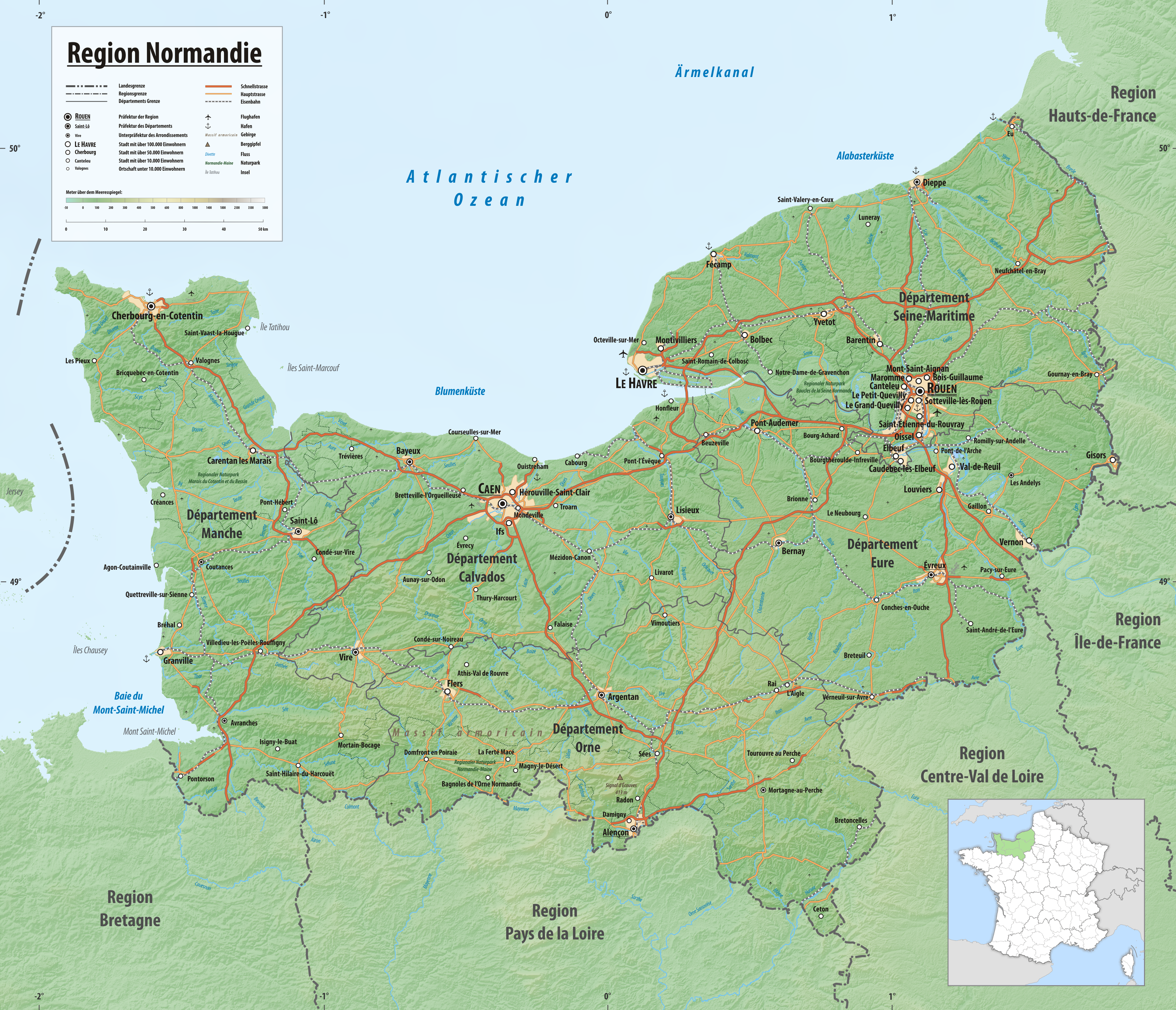 Reliefkarte der Region Normandie Topographischer Hintergrund: NASA Shuttle Radar Topography Mission (public domain). SRTM3 v.2.